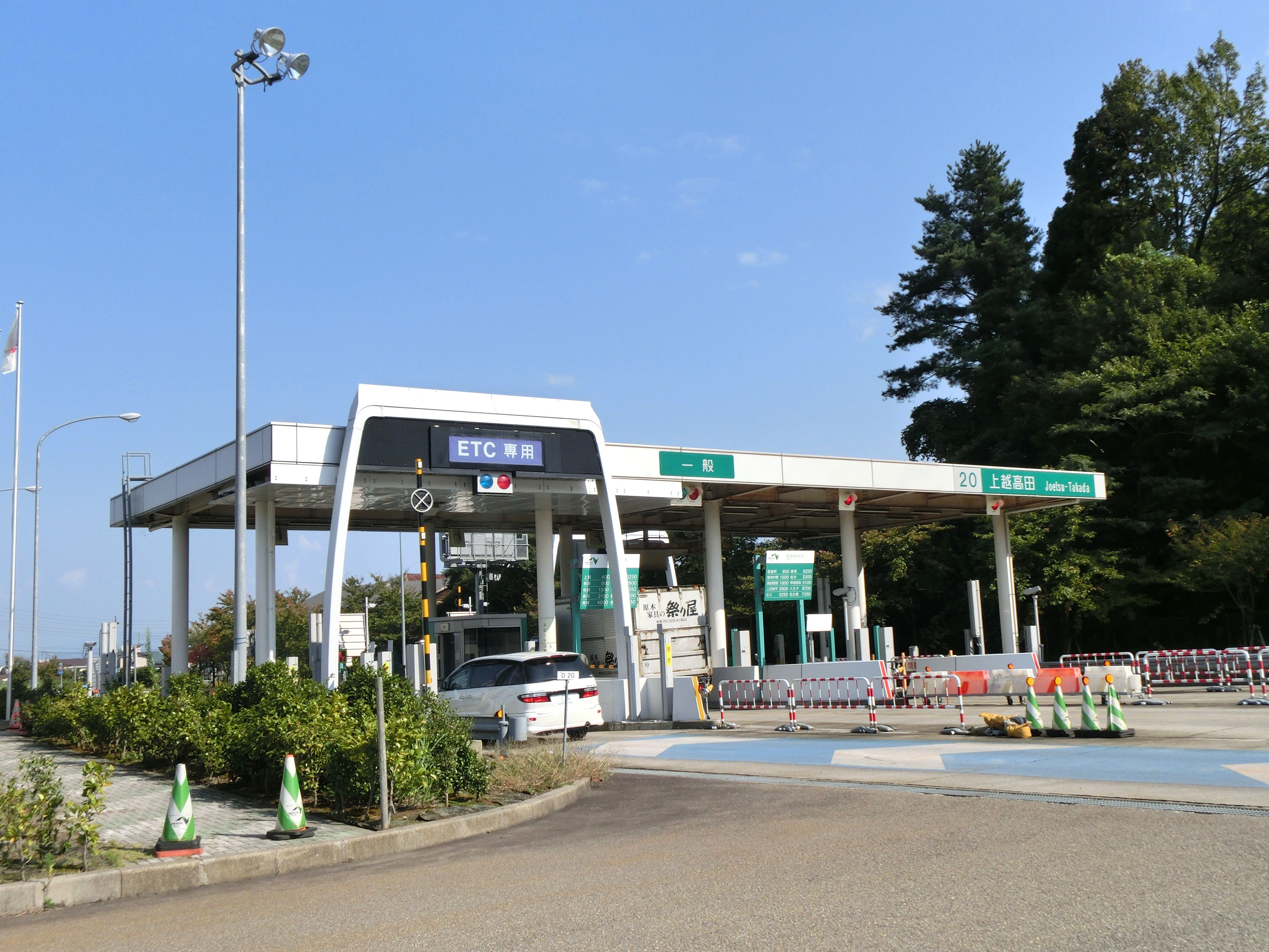 上信越自動車道 上越高田インターチェンジ（料金所付近）